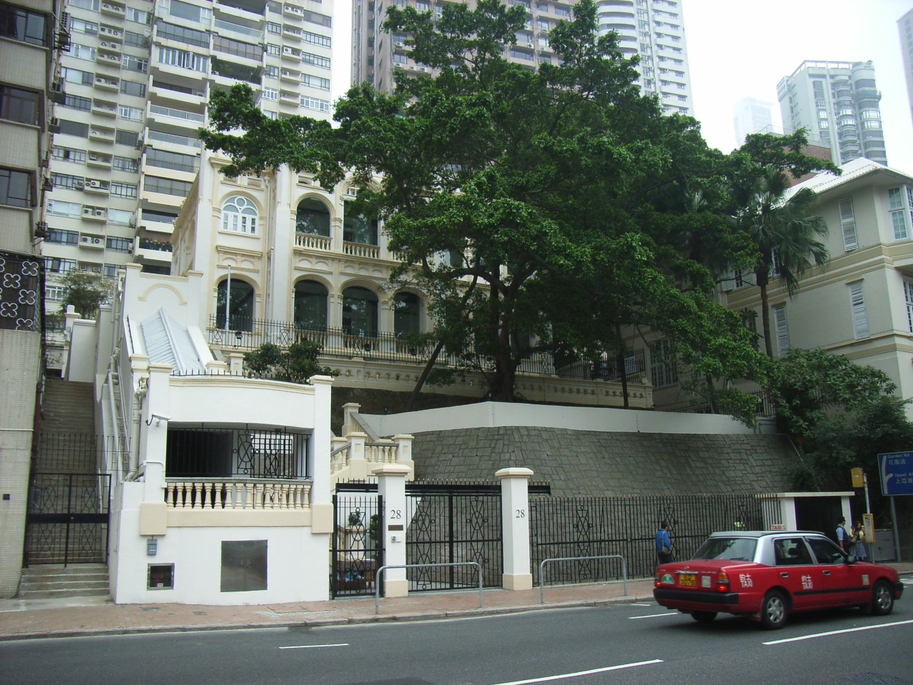 前任行政長官辦公室前稱舊英童學校, 堅尼地道, 28 Kennedy Road, Hong Kong